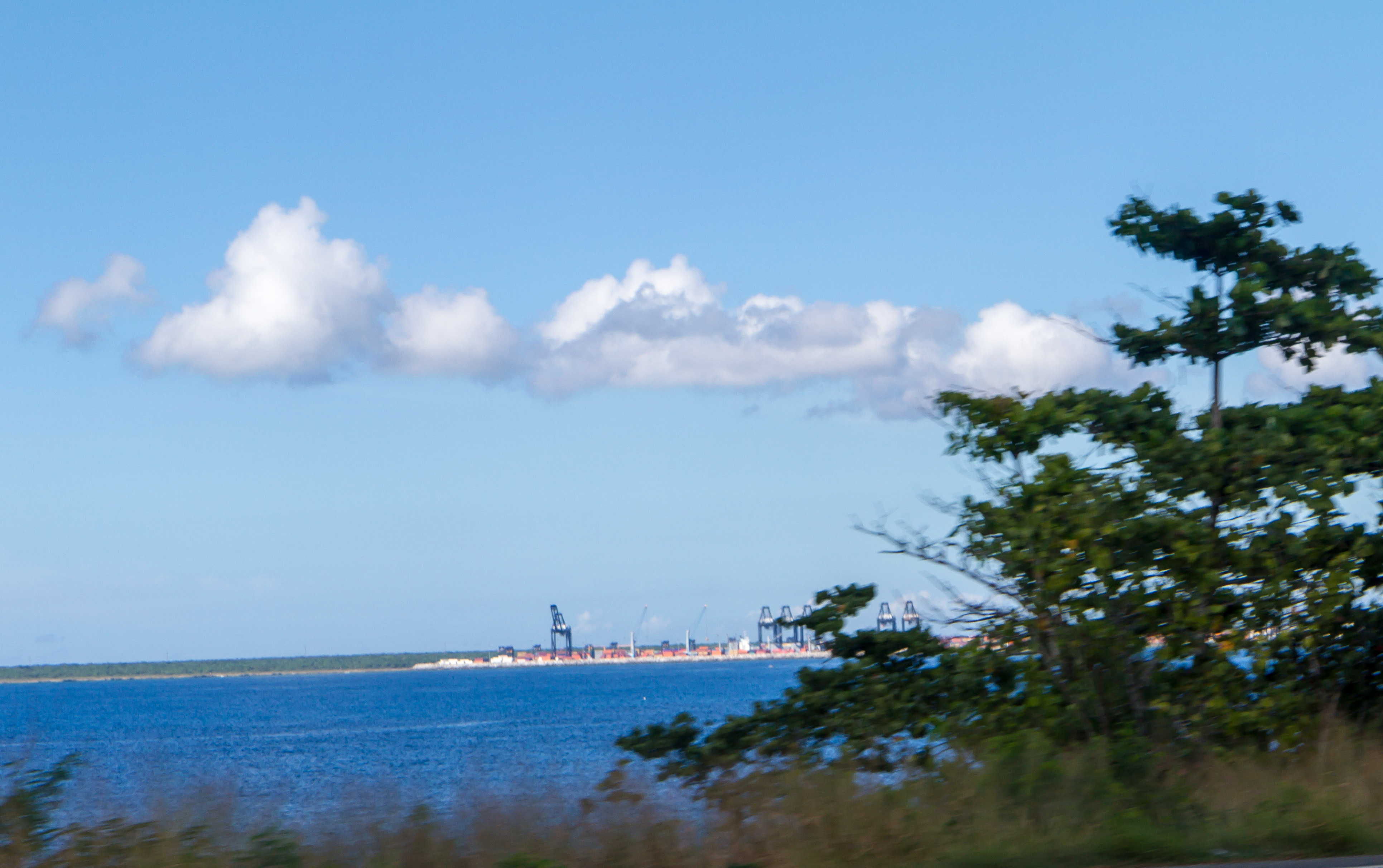 Santo Domingo, Dominican Republic